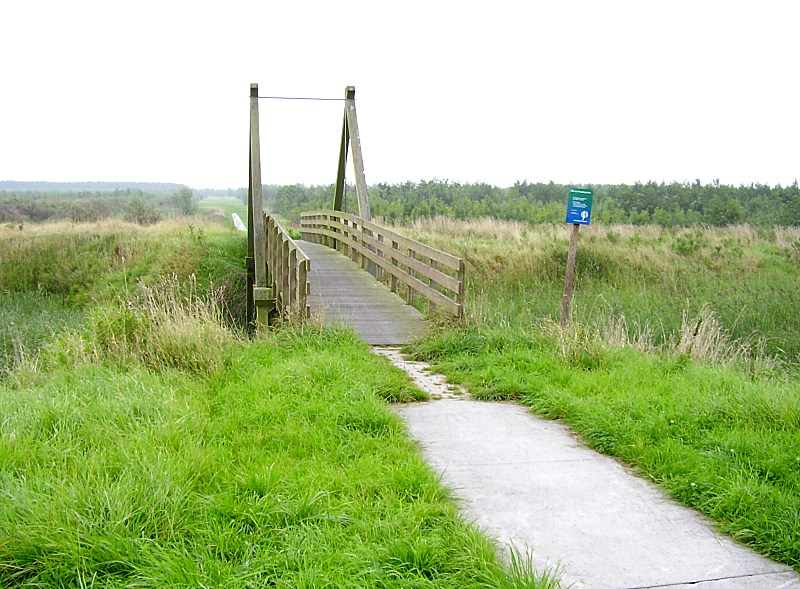 Fietspad door het Bos op Houwingaham. Eigen foto, genomen op 20-8-2005.